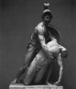 Pasquinogruppe. Rekonstruktion des hellenistischen Originals unter Verwendung von Fragmenten verschiedener römischer Marmorrepliken durch Bernhard Schweitzer (1936).